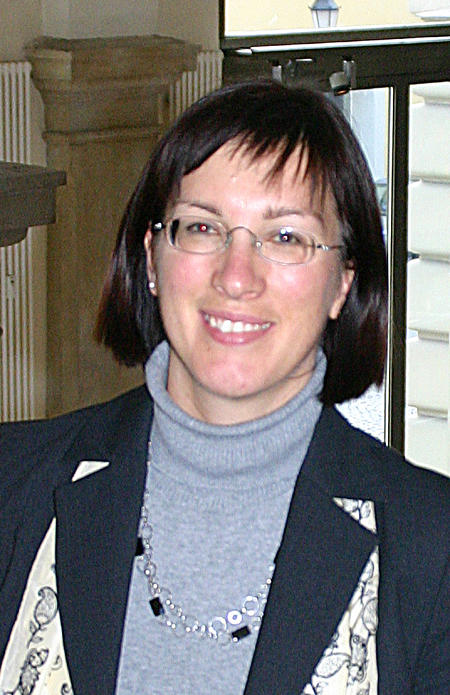 Stefanie Kühn, Finanzberaterin, Autorin von Finanzratgebern